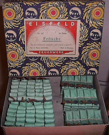 Uralte, riesige Knallfrösche aus Vorkriegszeiten. Herstellung Deutschland, Firma Eisfeld